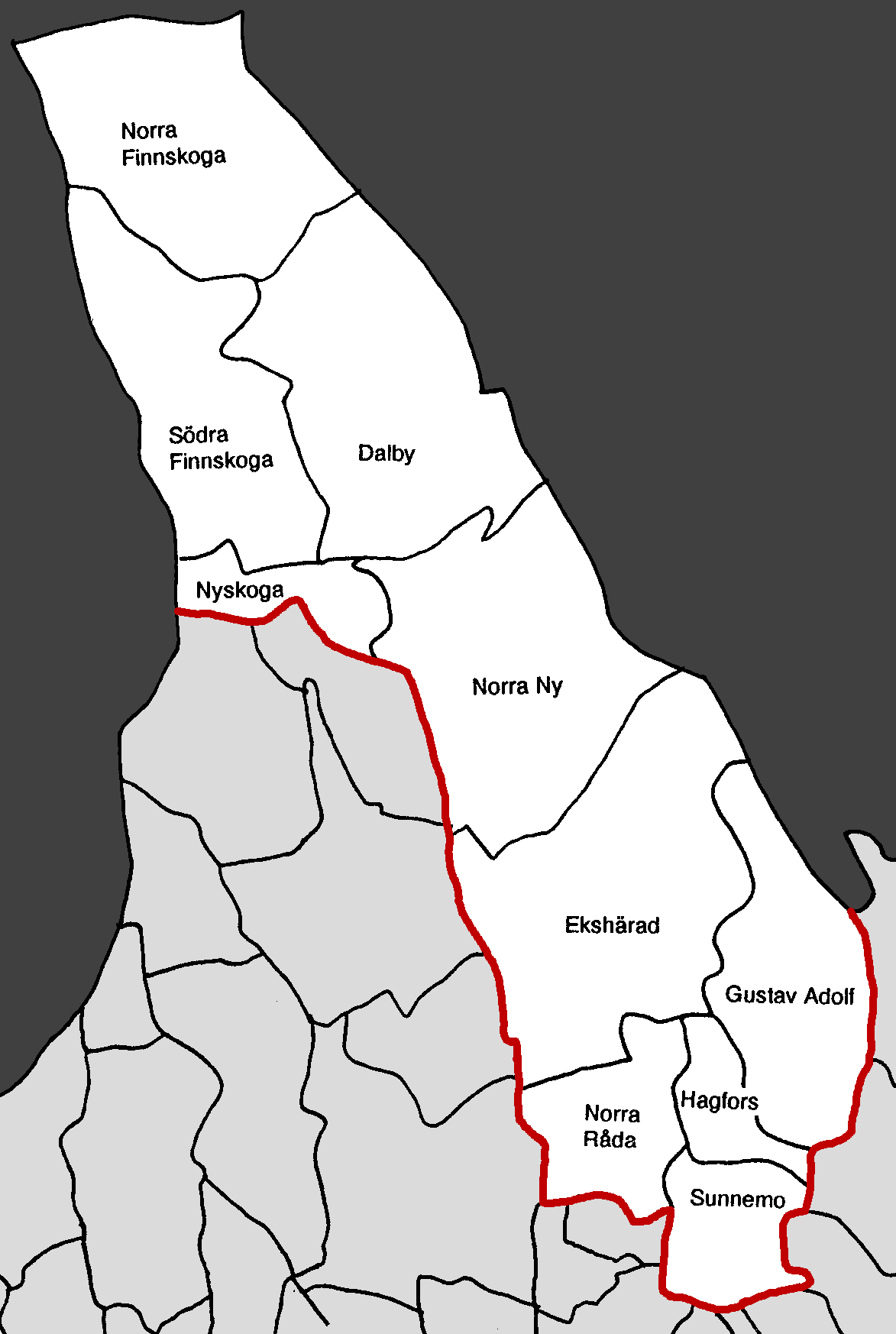 Bild över häradets socknar.